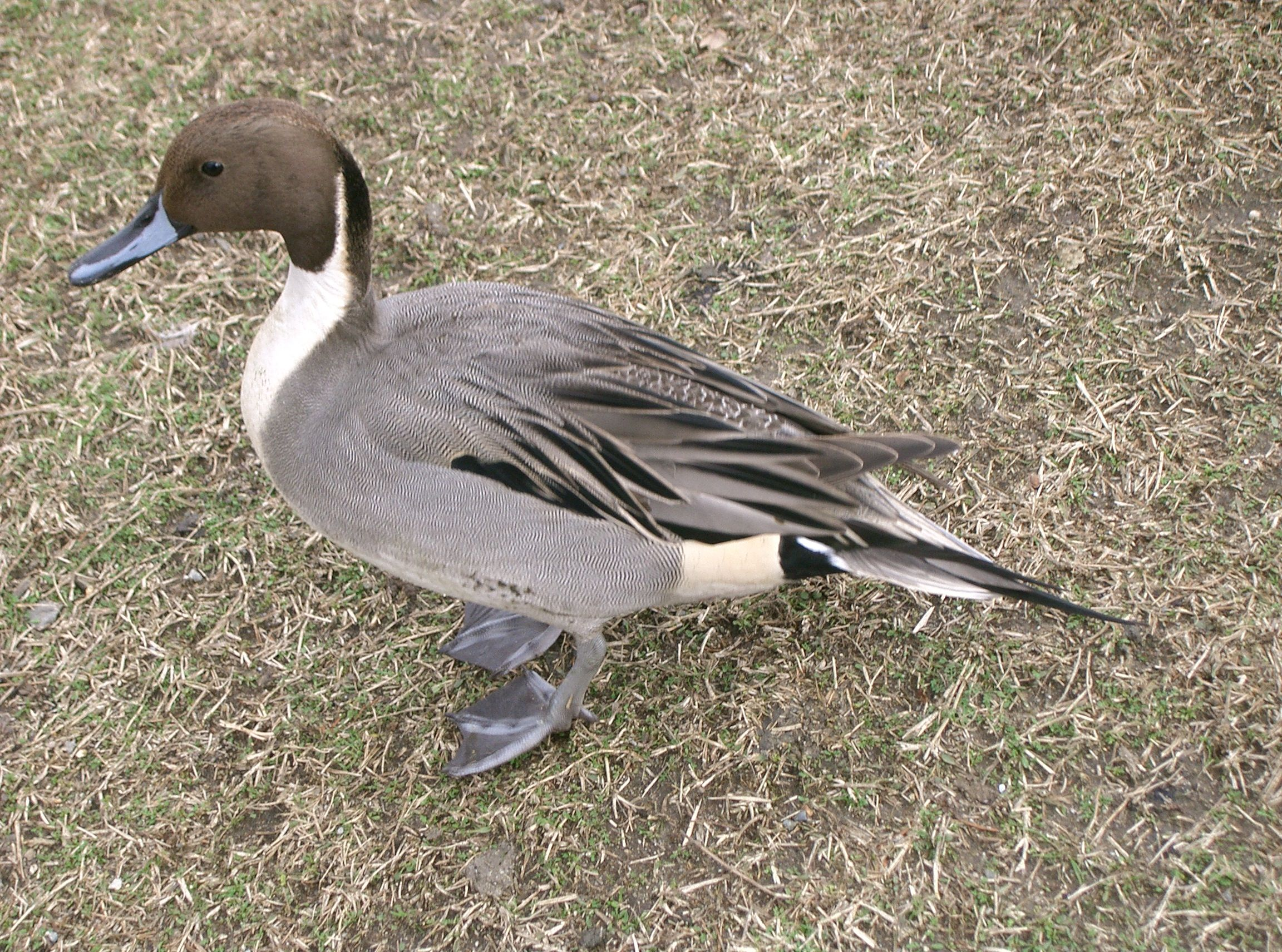 Anas acuta